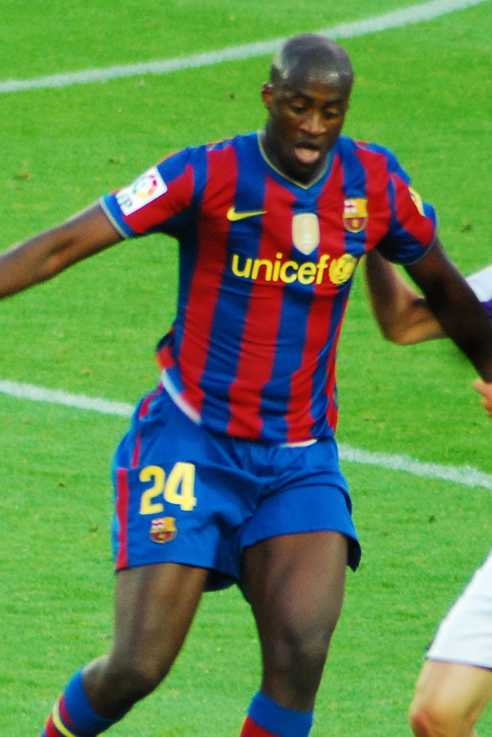 Touré Yaya disputa un balón con un jugador del Real Valladolid, en un partido de la Liga 2009-2010.